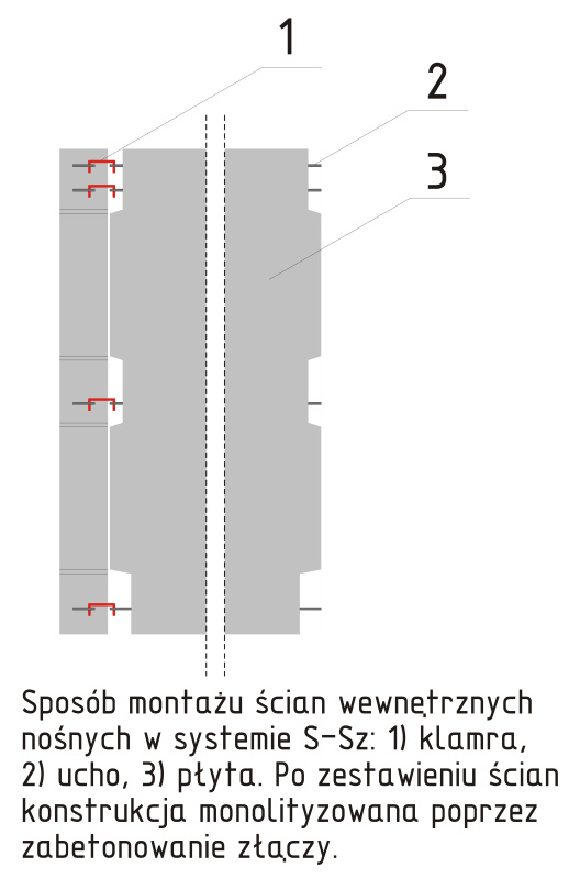 Schemat łączenia ścian wewnętrznych konstrukcyjnych w wielkopłytowym systemie szczecińskim (S-Sz).